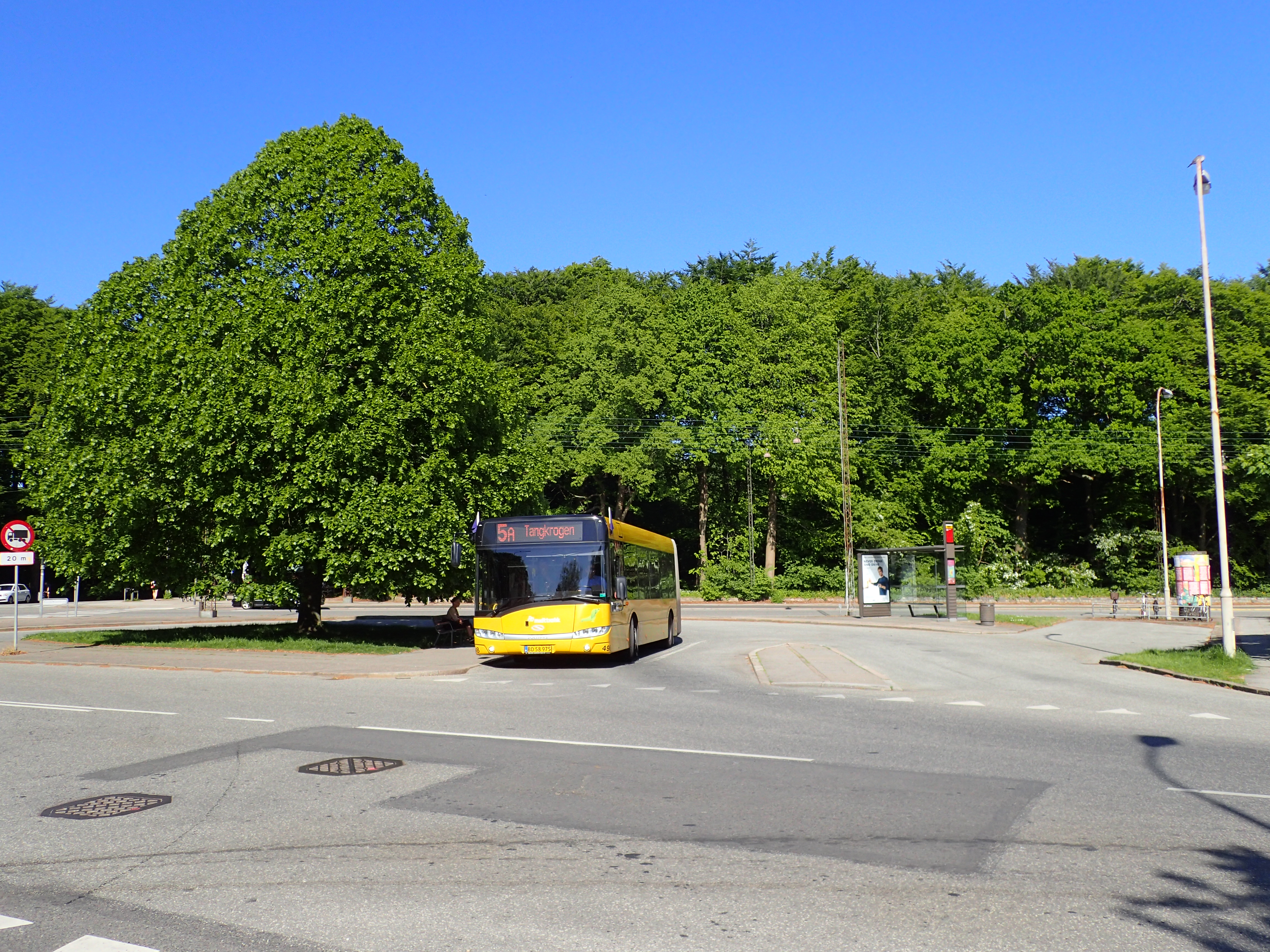 Marienlund, bus terminal.